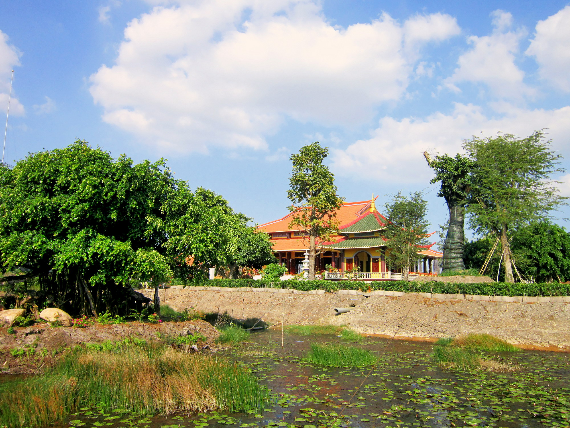 Thiền viện Trúc Lâm Chánh Giác ở xã Thạnh Tân huyện Tân Phước, tỉnh Tiền Giang,Việt Nam.